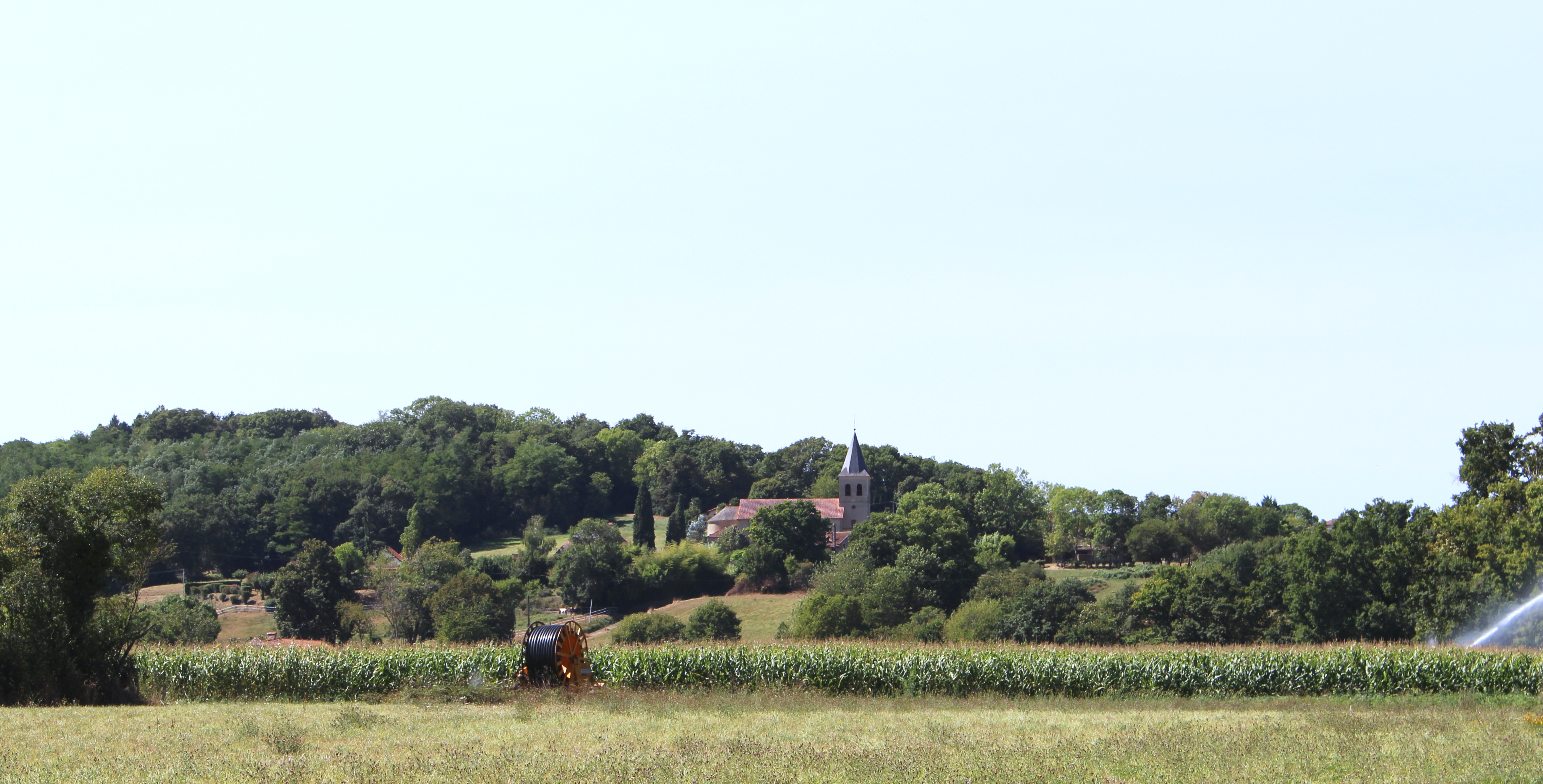 Vidouze (Hautes-Pyrénées)